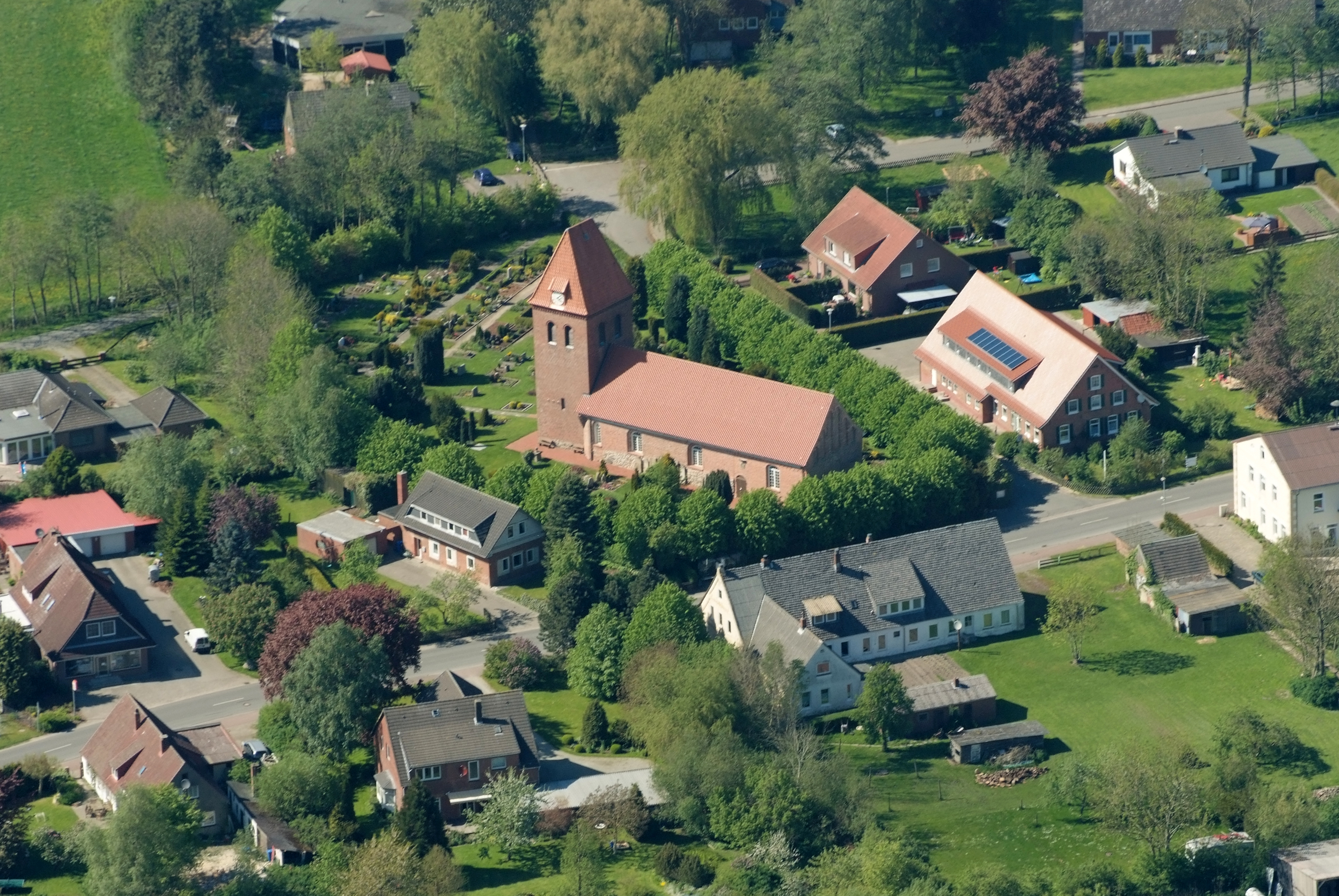 St. Georg-Kirche in Spieka (Nordholz) Fotoflug vom Flugplatz Nordholz-Spieka über Bremerhaven, Wilhelmshaven und die Ostfriesischen Inseln bis Borkum